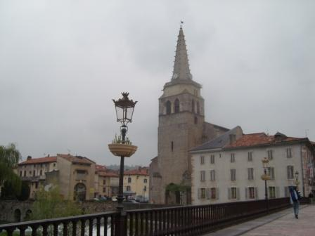 Kyrkan i Saint-Girons (Ariège, Frankrike).